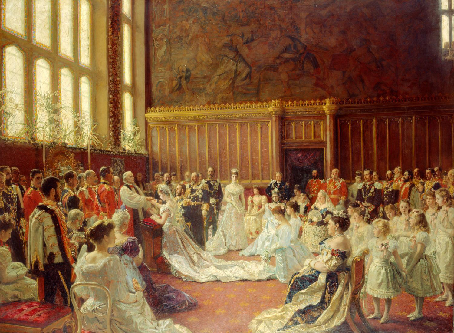 Detail, Koningin Victoria